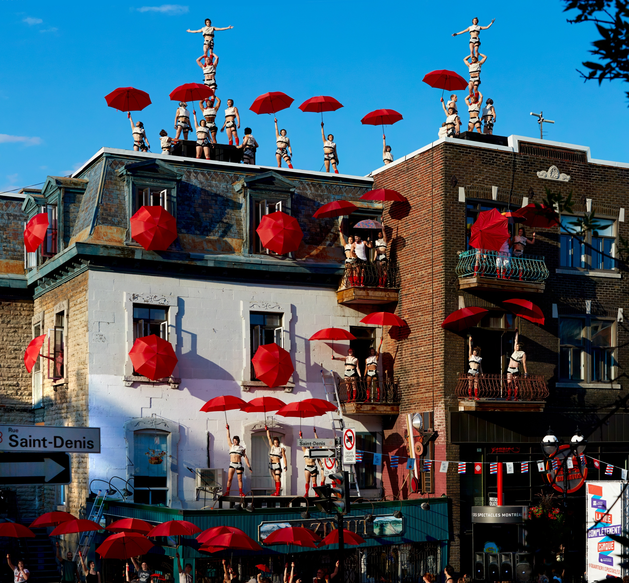 crédit Andrew Millet